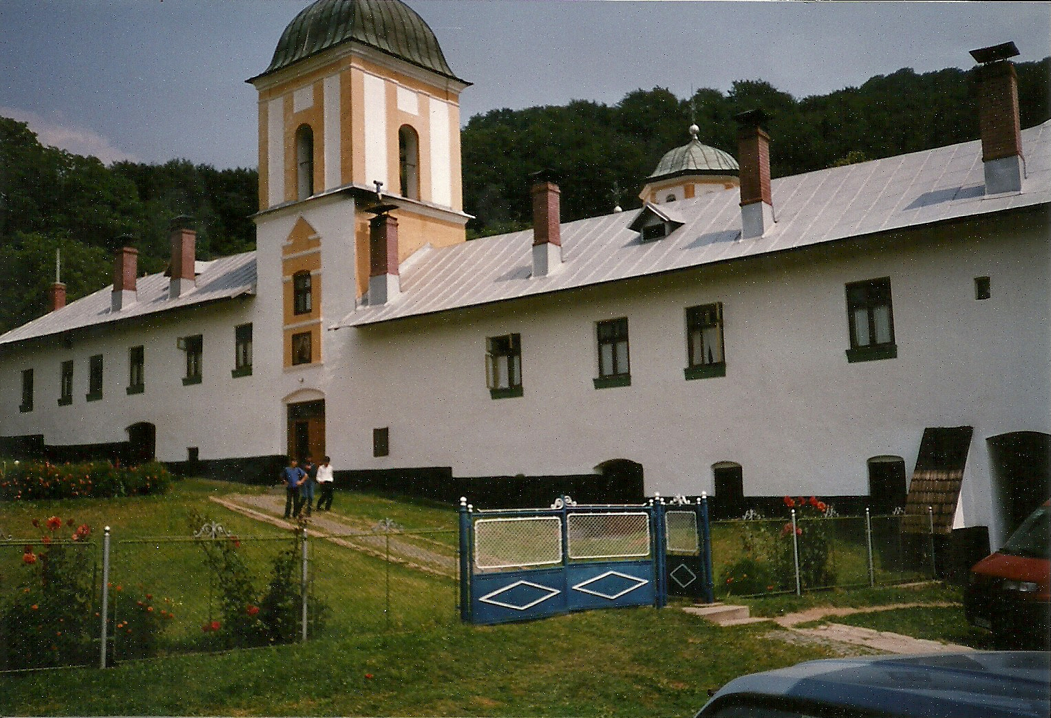 Glockenturm und Mönchszellen des Klosters Frăsinei der Gemeinde Muereasca, im Kreis Vâlcea in Rumänien.